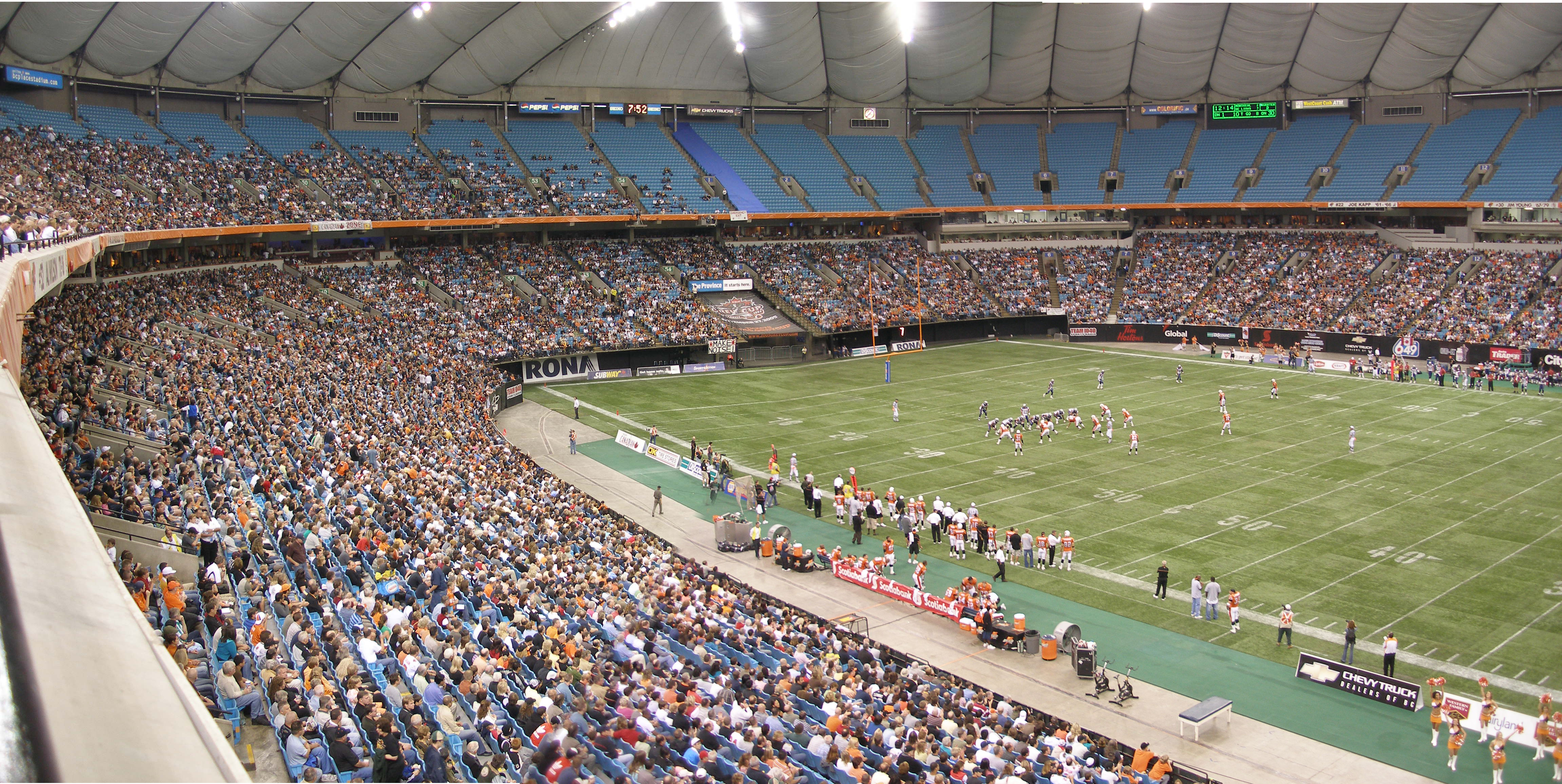 September 2005